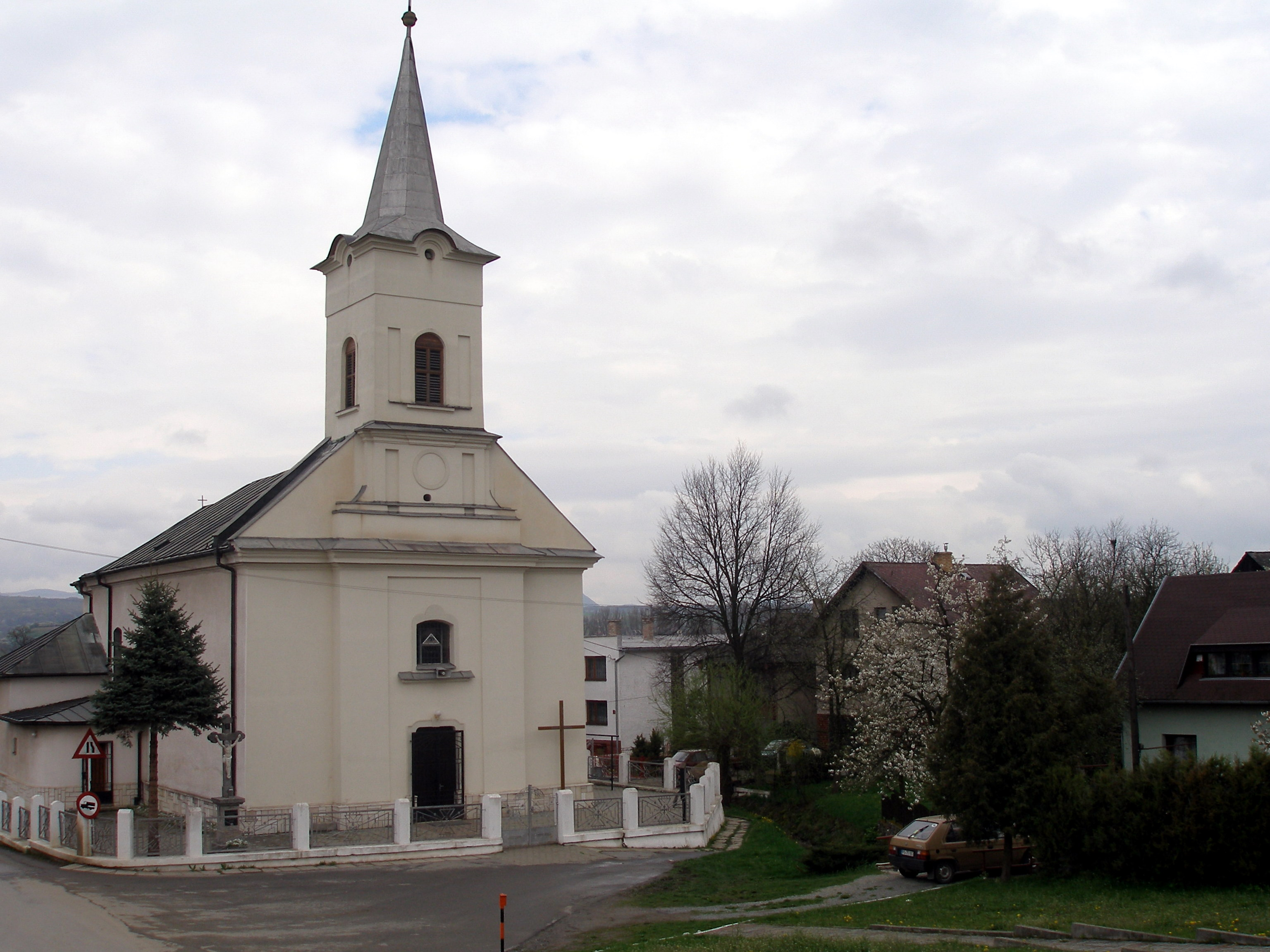 Obec Kendice okres Prešov, región Šariš